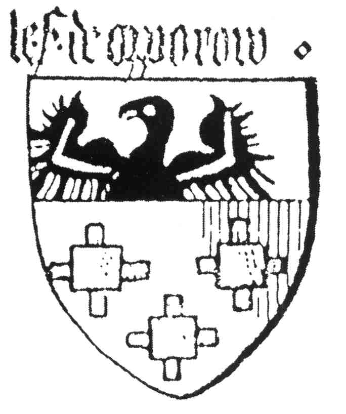 Herb Sulima w burgundzkim Herbarzu Złotego Runa z ok. 1435 r.